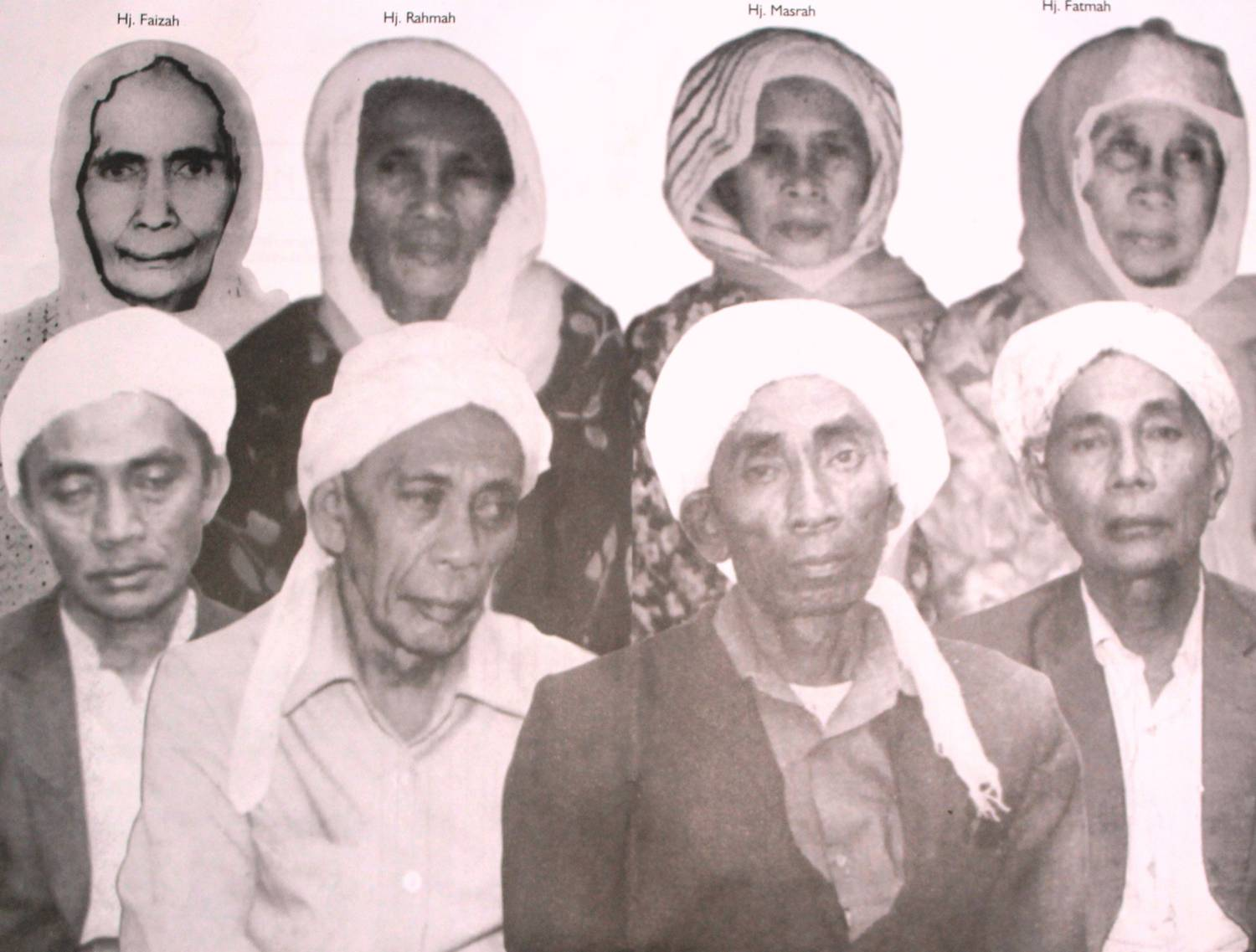 Foto keturunan Alm. TGH. Makmun Karanglebah Praya. Di depan dari kiri ke kanan : Alm. TGH. Najmuddin Makmun , Alm. TGH. Muhsin Makmun, Alm. TGH.Idris Makmun, Alm. TGH. Khalil Makmun. DIbelakang dari kiri ke kanan : Almh. Hj. Faizah, Alh. Hj. Rahmah, Almh. Hj. Masrah, dan Almh. Hj. Fatmah